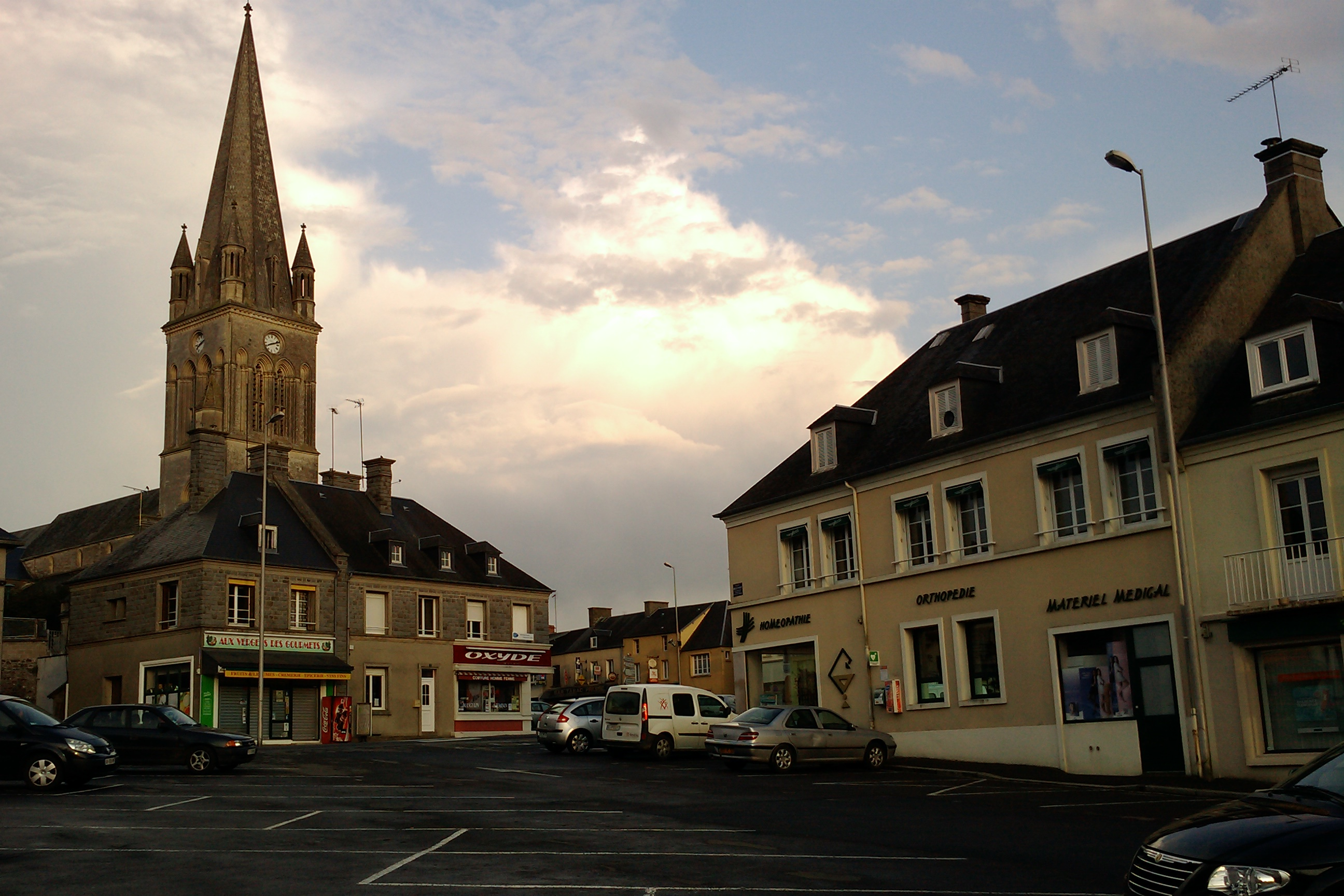 église néo-gothique de Marigny (Manche)